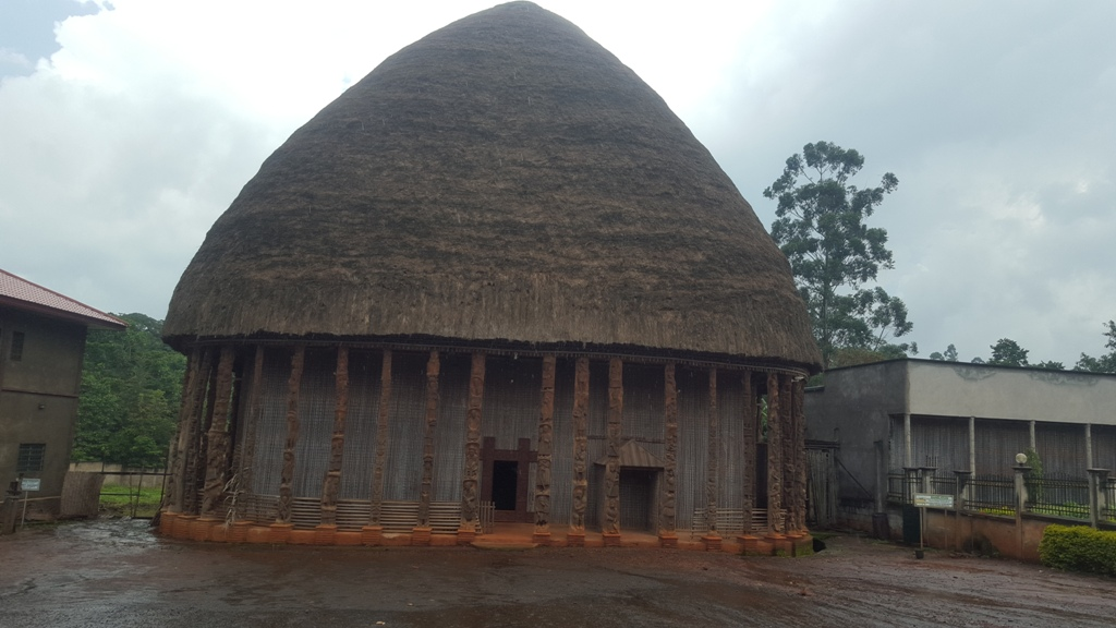 A beautiful traditional hut of the Bandjoun chiefdom is located in the west region of Cameroon.